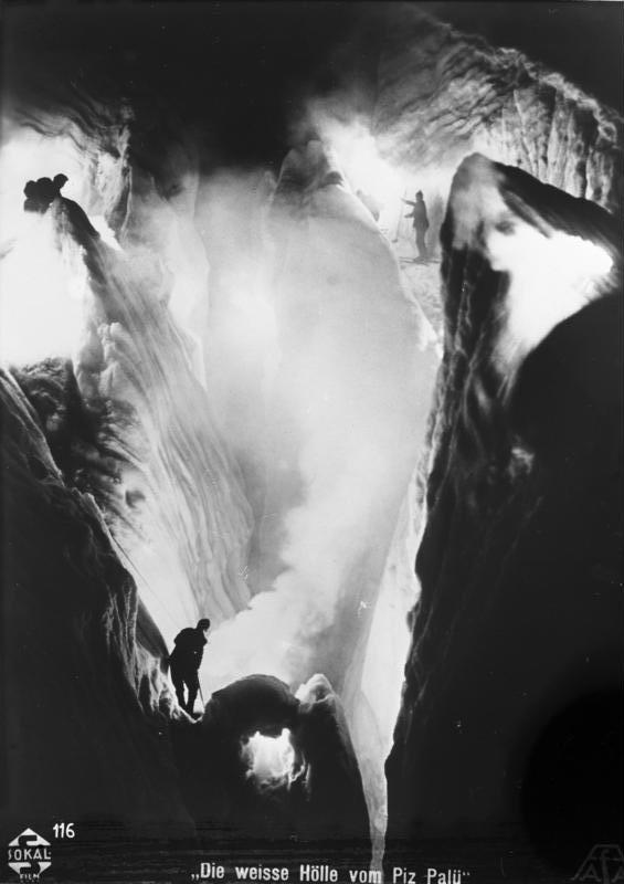 Gefahrvolle Alpinistik an vereisten Felswänden im Hochgebirge bei nacht ! Blick in eine Gletscherspalte während eines nächtlichen Aufstieges mit Fackeln, im Gletschergebiet der Bernina Alpen. "Die weise Hölle vom Piz Palü"